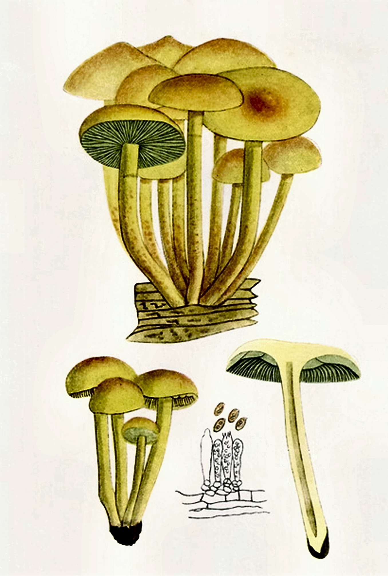 Giacomo Bresadola: Hypholoma fasciculare